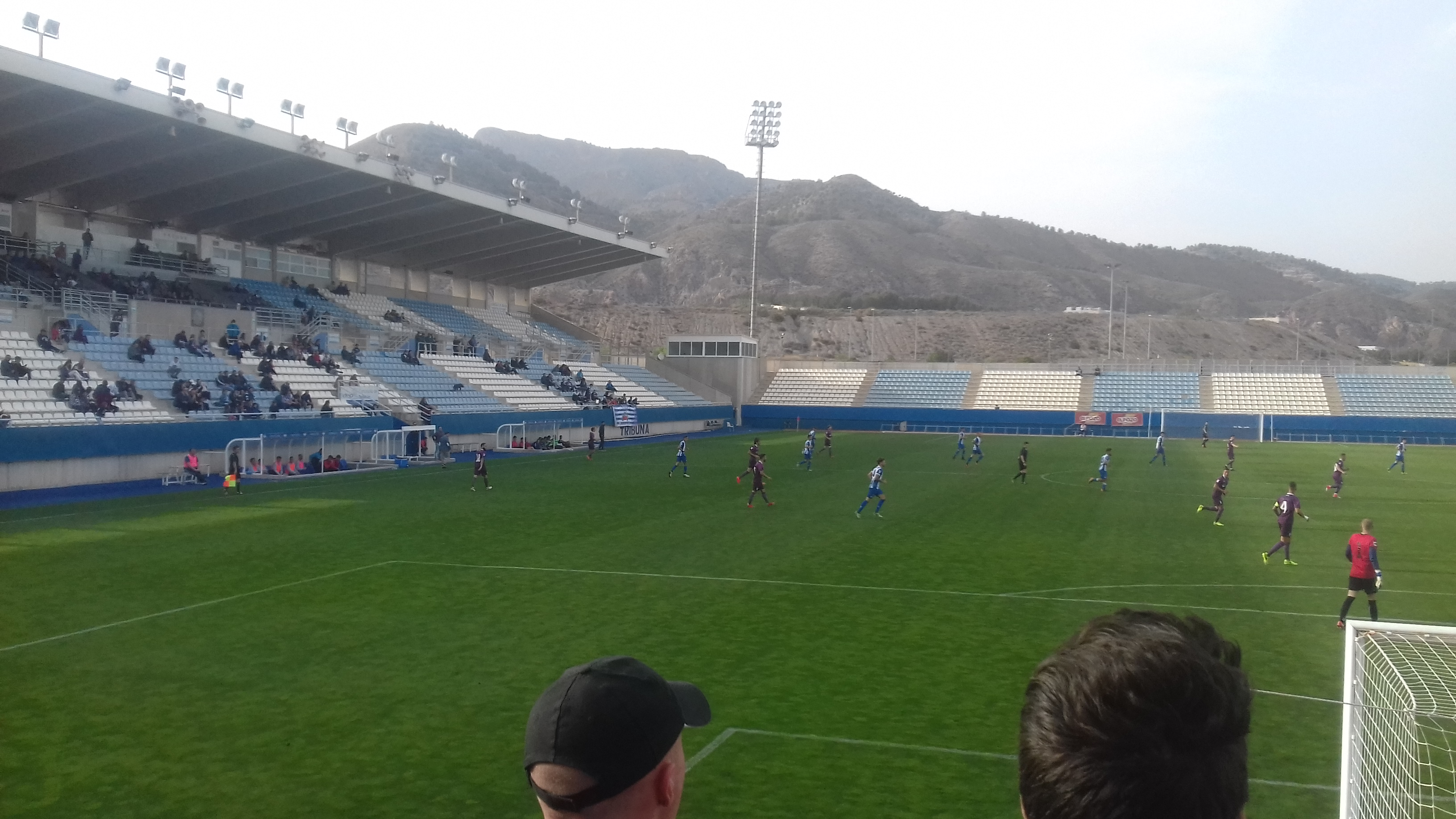 CF Lorca Deportiva - FC Jumilla (22-04-2018)